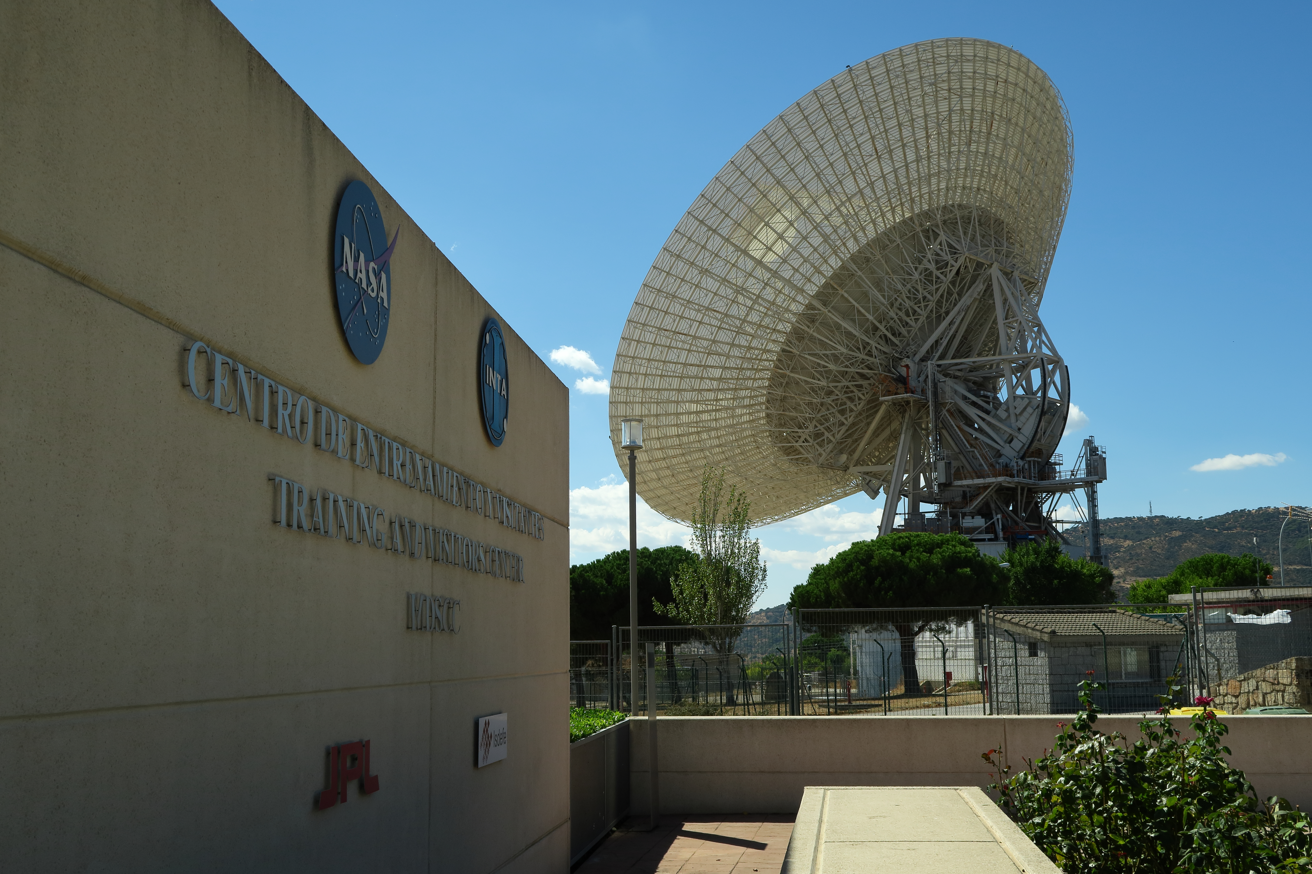 Antena 70 metros desde la entrada al museo del Complejo de Comunicaciones del Espacio Profundo de Madrid